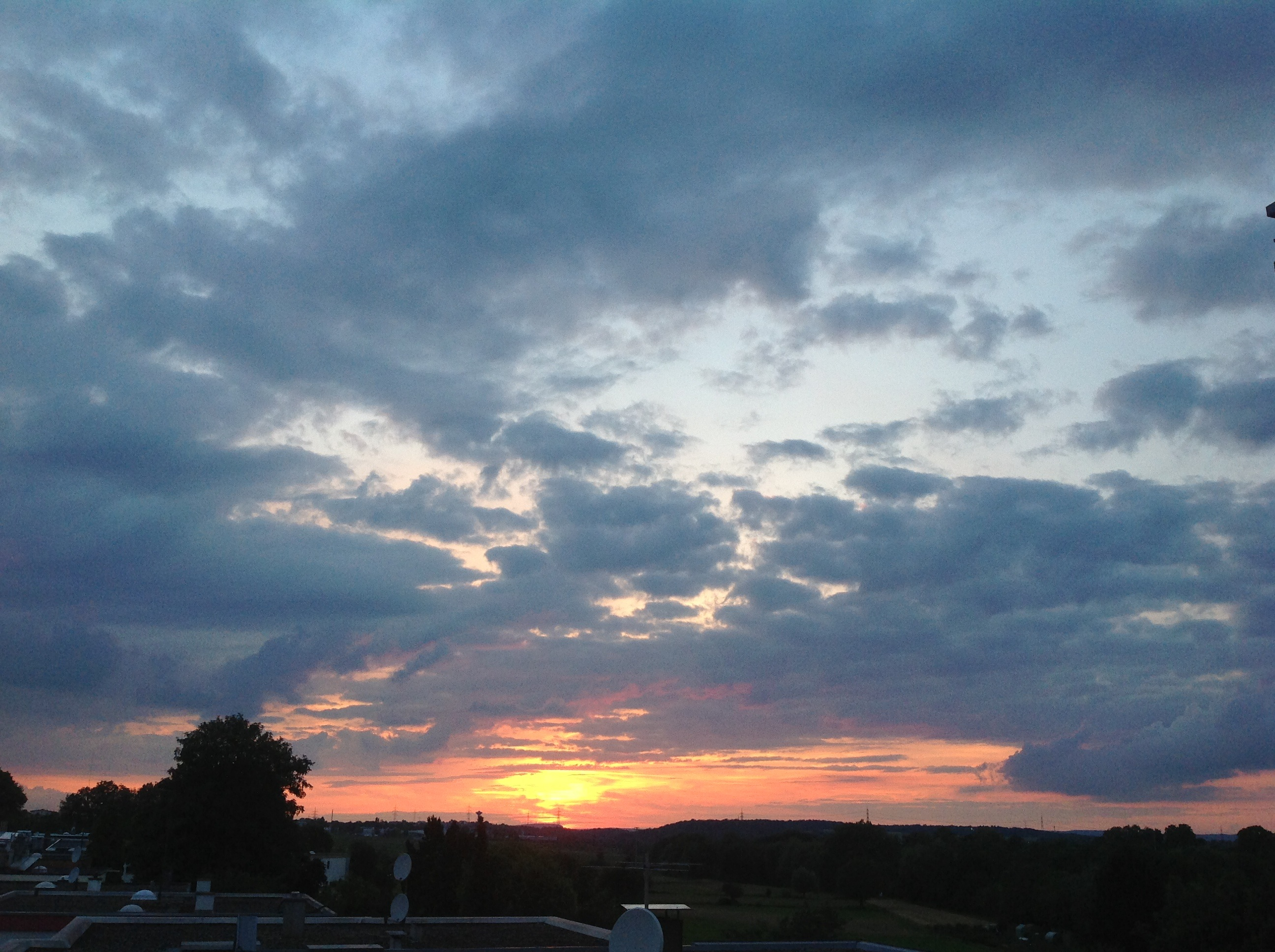 Möglingen in Richtung Markgröningen